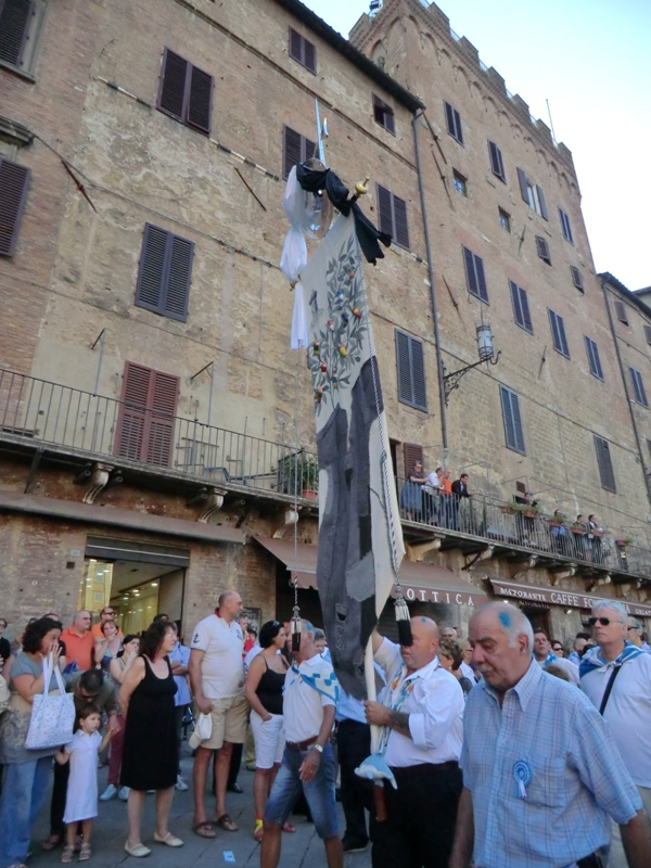 Il drappellone del Palio di Siena, portato dai contradaioli dell'Onda